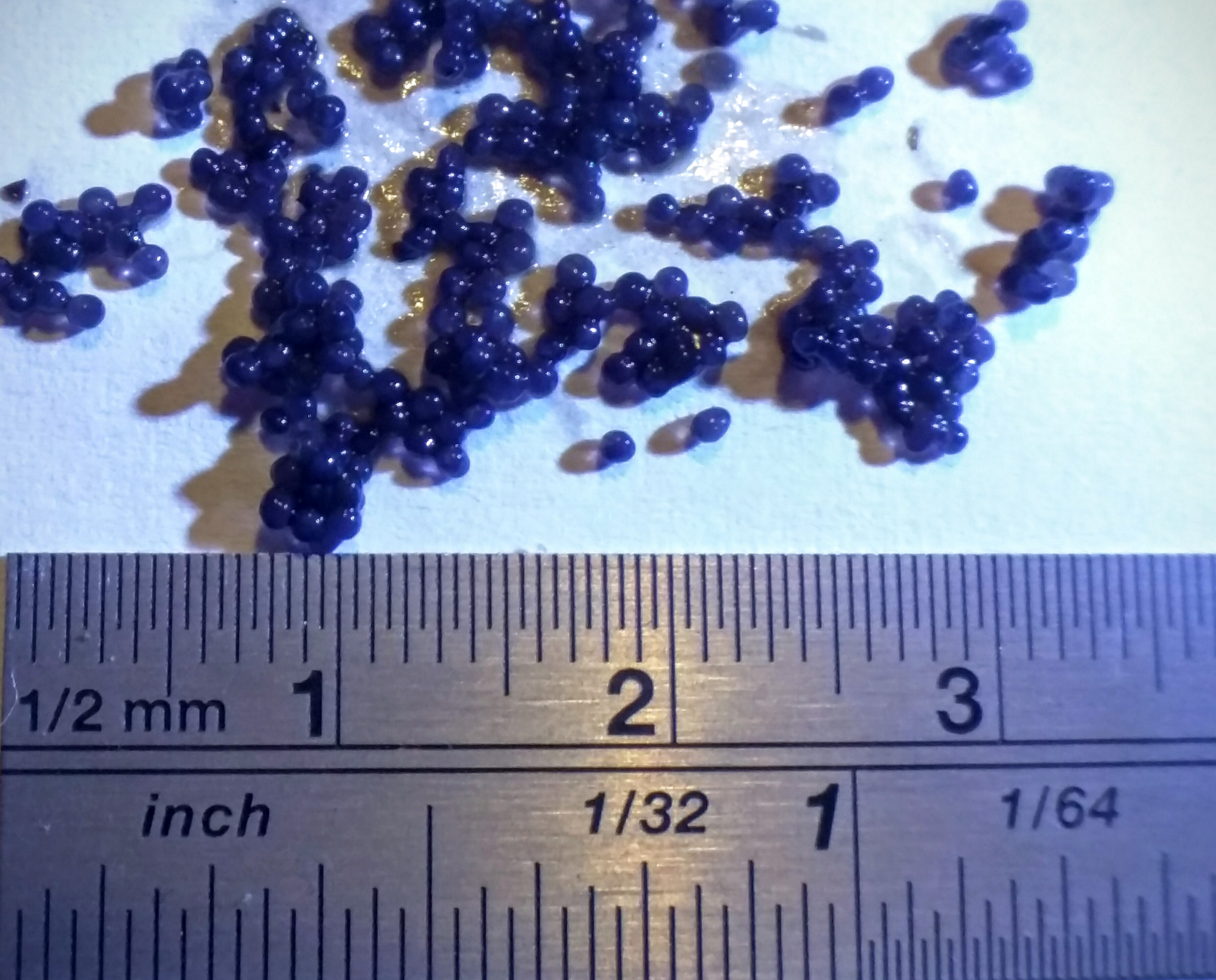 Uova di mallotto, tinte e pastorizzate per l'alimentazione umana